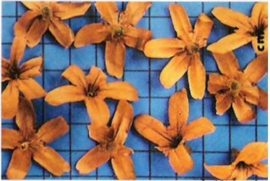 Foto genérica das flores em fase de frutificação da árvore de freijó (Cordia goeldiana)